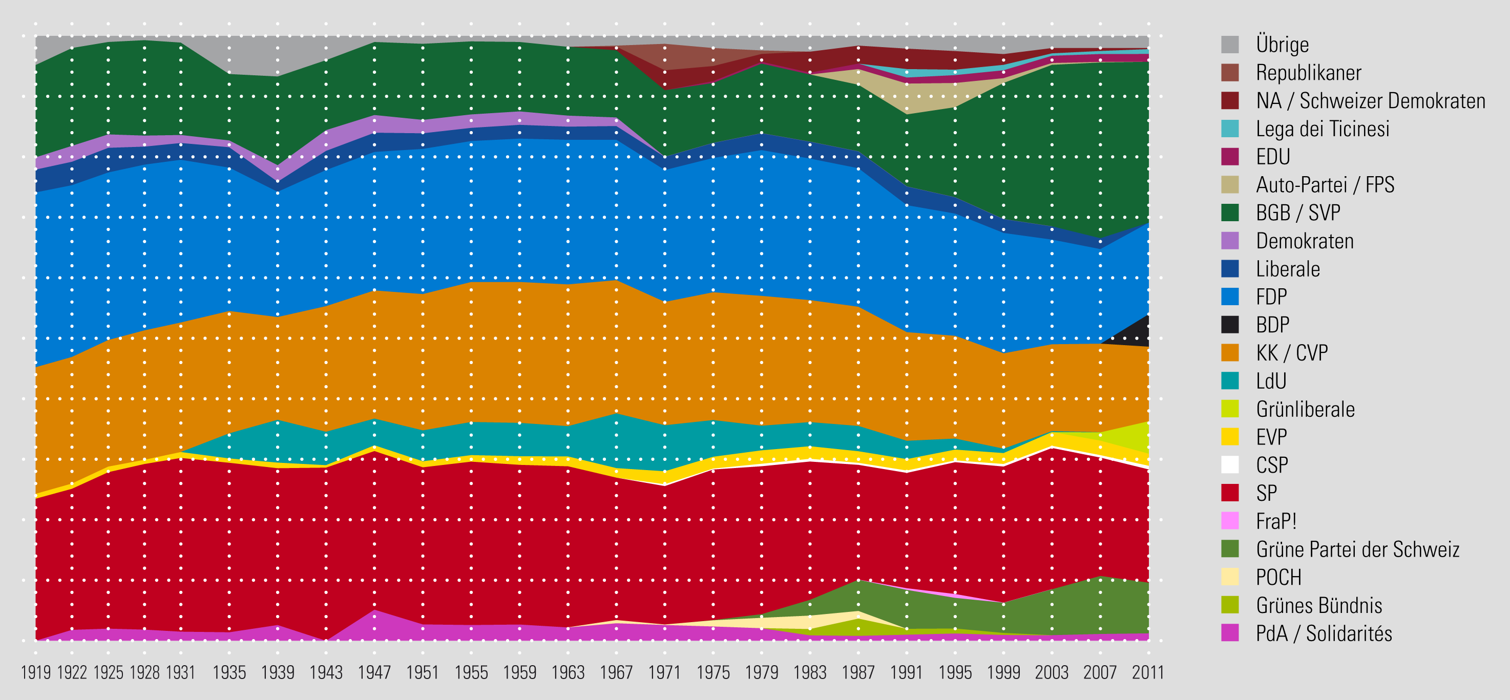 Wähleranteil der Parteien im Schweizer Nationalrat, 1919-2011